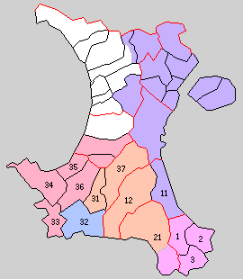 後の鹿児島県揖宿郡・川辺郡域の町村制時点の町村（離島は省略）。